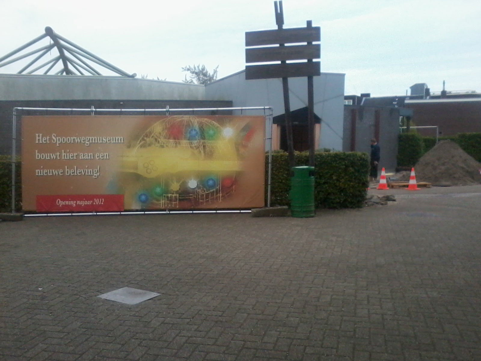 Attractie "De Vuurproef" in het Nederlands Spoorwegmuseum in aanbouw.